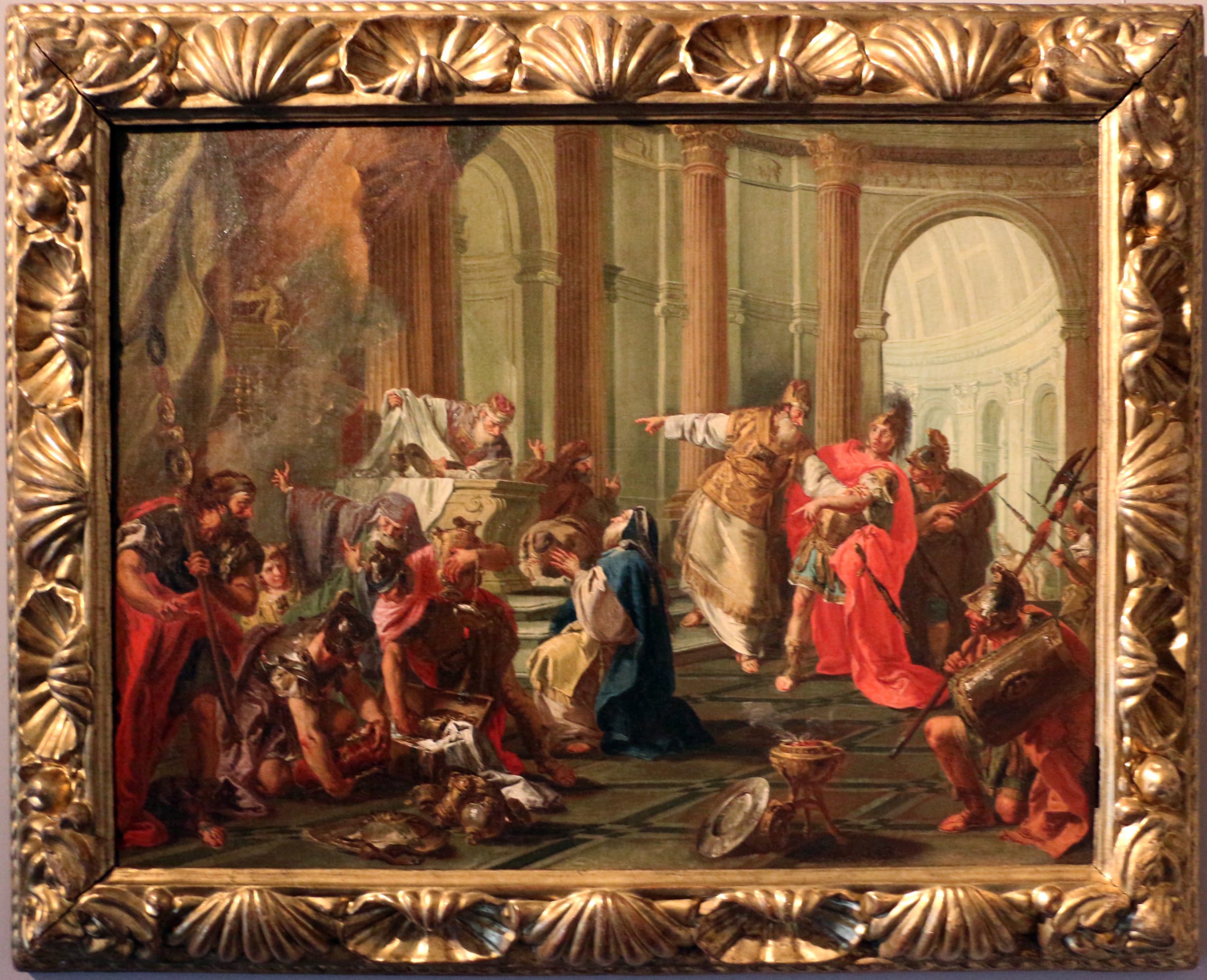 crasso saccheggia il tempio di gerusalemmeCrassus sacks the temple of Jerusalemtitle QS:P1476,it:"crasso saccheggia il tempio di gerusalemme" label QS:Lit,"crasso saccheggia il tempio di gerusalemme"